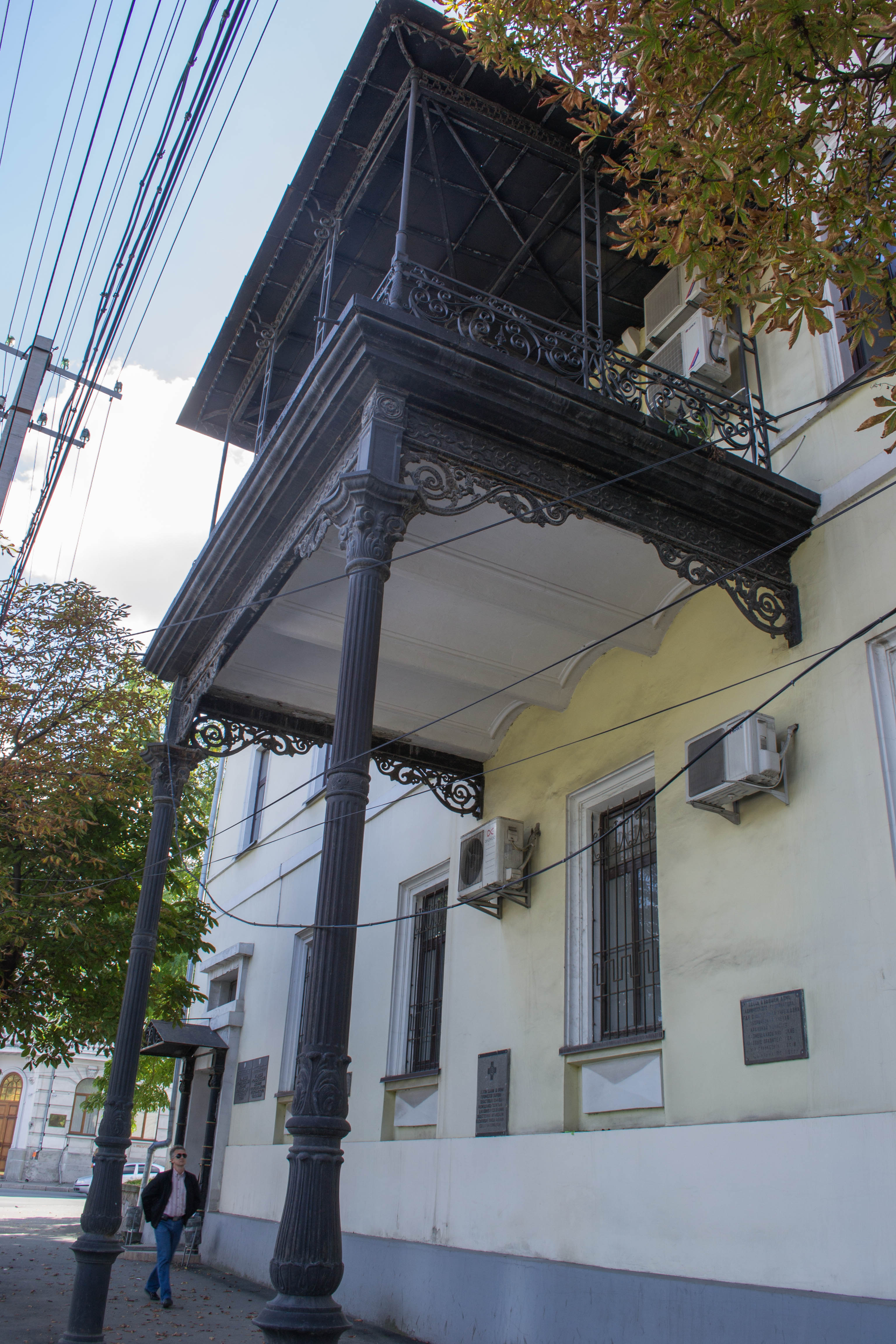 Колишній будинок губернатора Таврійської губернії, 1835 р. (будівля, в якому в 1920–1921 рр.. перебував ревком Криму), Сімферополь, вул. Леніна, 15, літер «А»